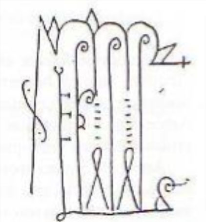 Assinatura de Afonso IV de Leão